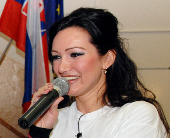 Karin Majtánová